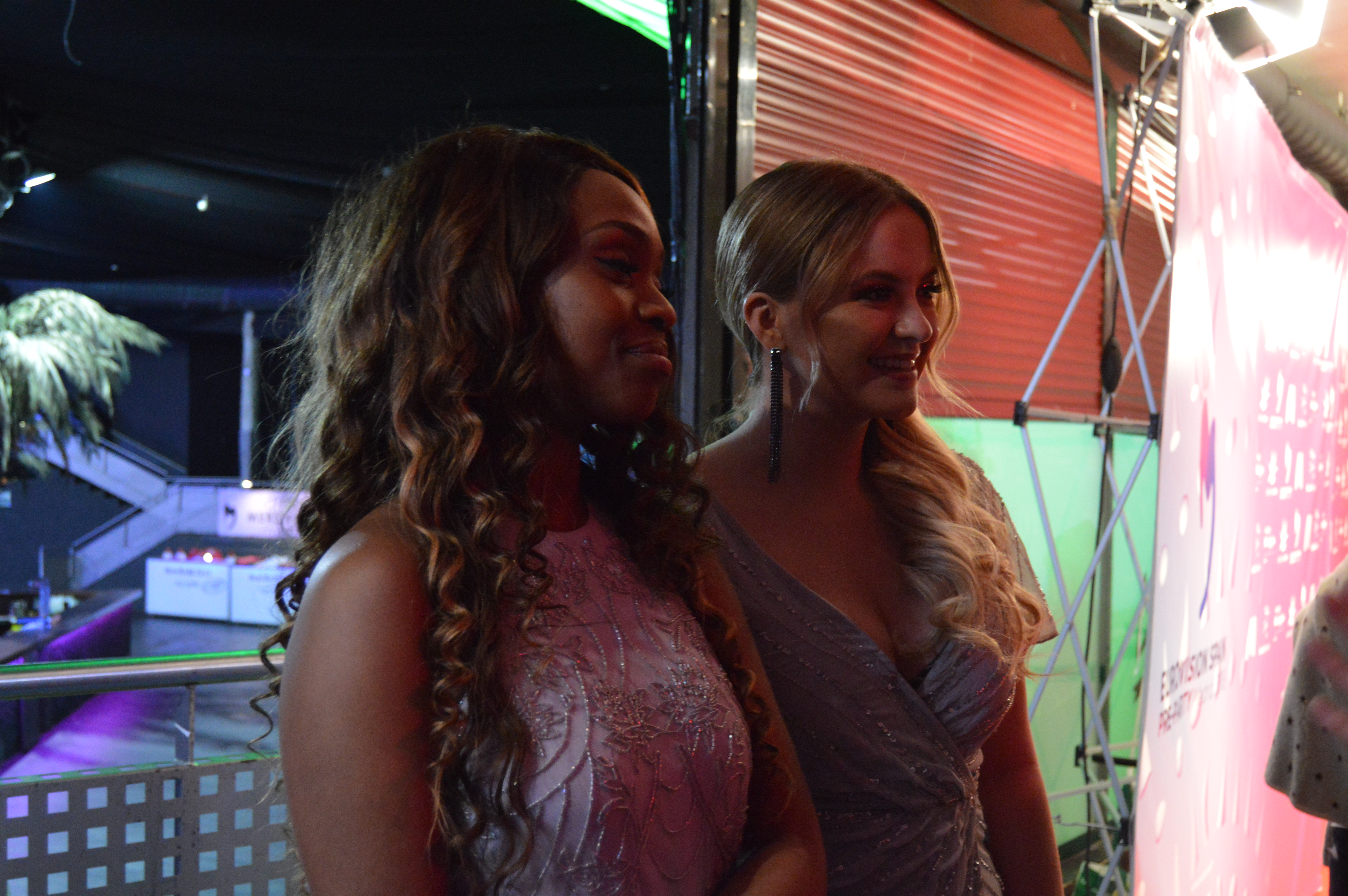 El dúo noruego formado por Stella Mwangi & Alexandra Rotan ante los medios en la Eurovision Spain PreParty 2018 en Madrid (Abril 2018)